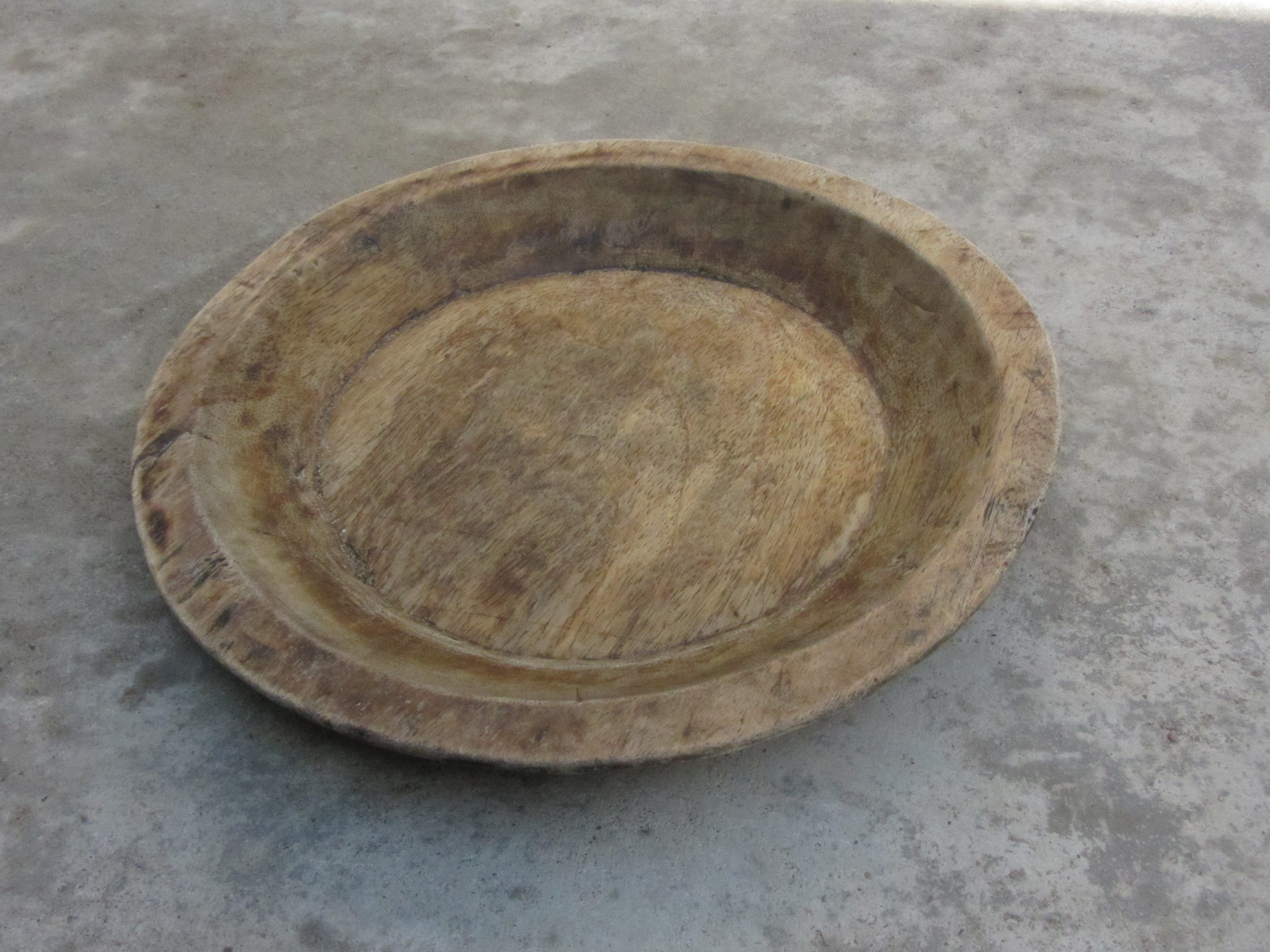 own creation - (Soymida febrifuga) செம்மரம் என்னும் சே மரத்தால் செய்யப்பட்ட உண்கலத் தட்டு